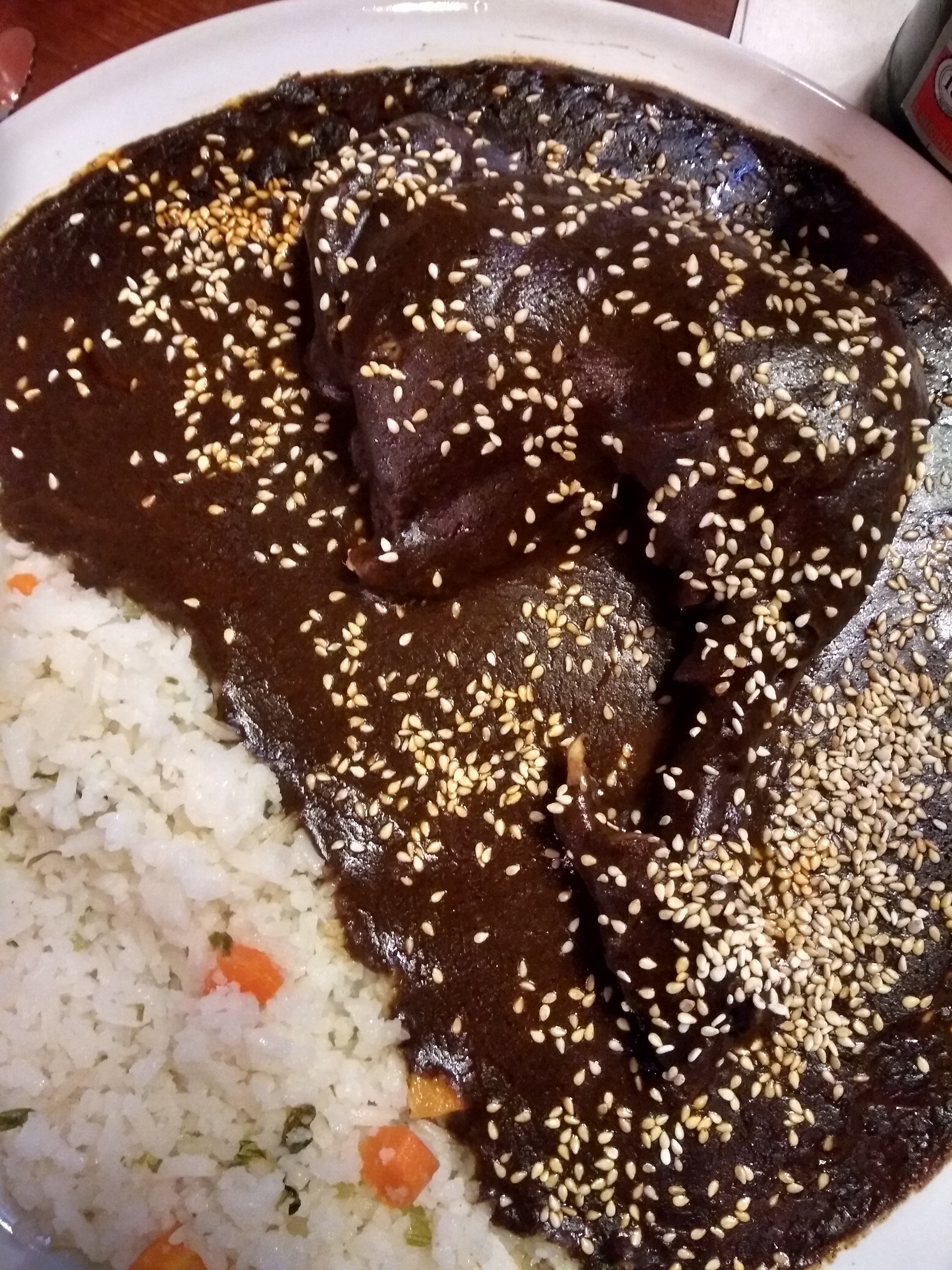 Mole poblano